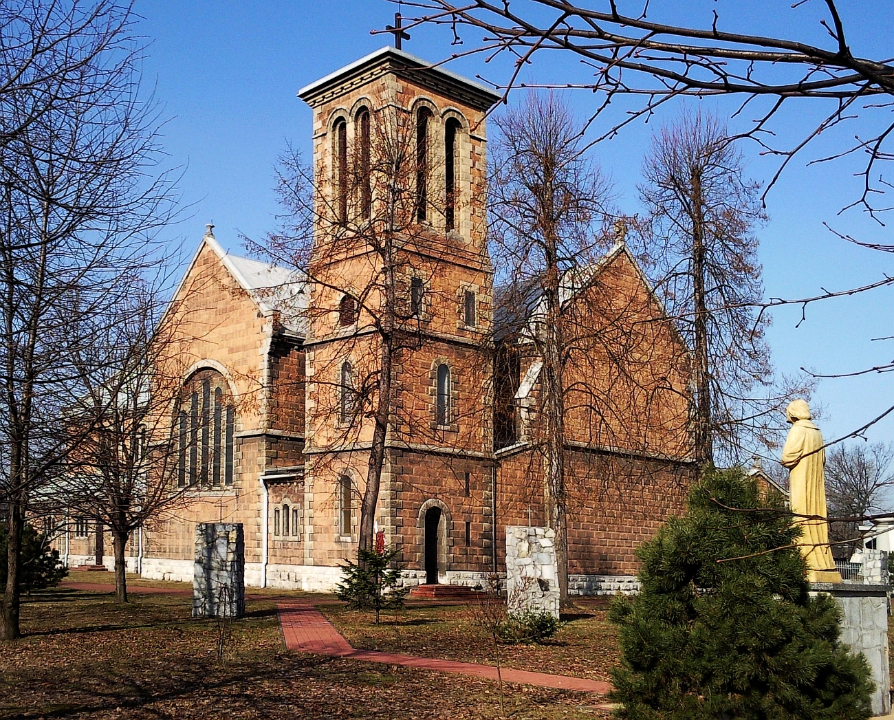 Kościół Matki Bożej Bolesnej w Czeladzi – Piaskach przy ulicy Kościuszki 5